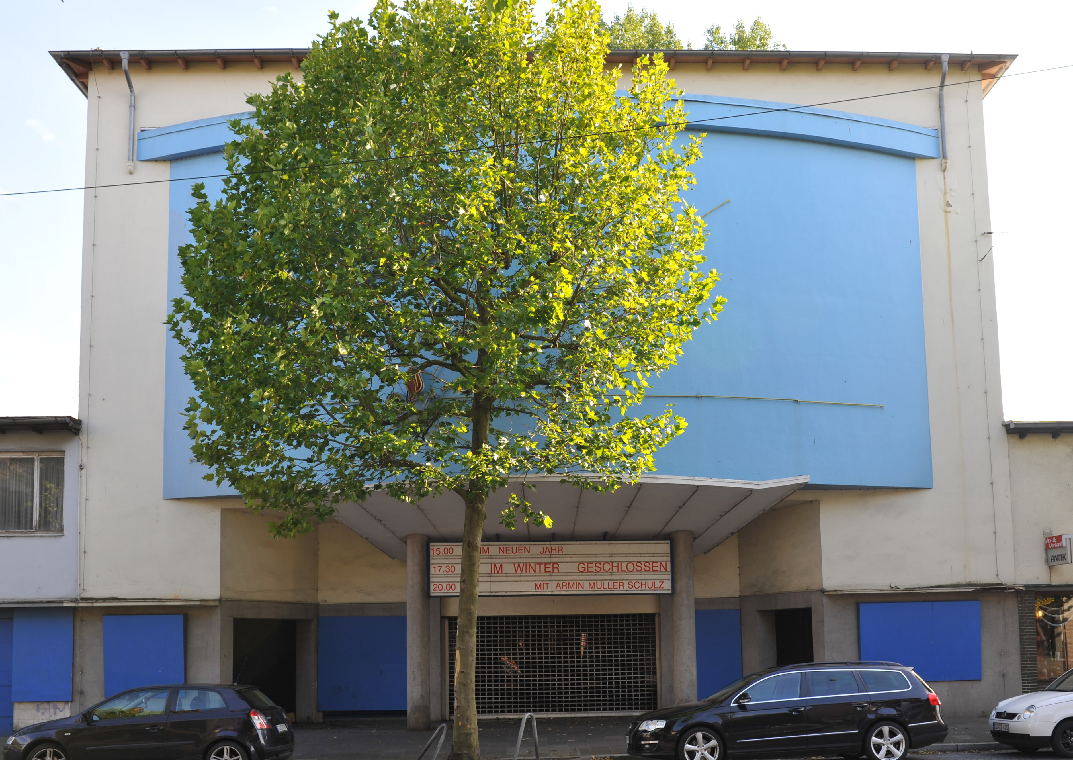 Historical building in Bremerhaven, northern Germany Kino Aladin, Rickmersstraße 11/13, 1955–1956 von Heinz Feuerhack Das abgebildete Objekt ist ein geschütztes Kulturdenkmal in der Freien Hansestadt Bremen, mit der Nr. 1769 beim Landesamt für Denkmalpflege registriert.